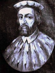 Dipinto del doge e cardinale Paolo di Campofregoso